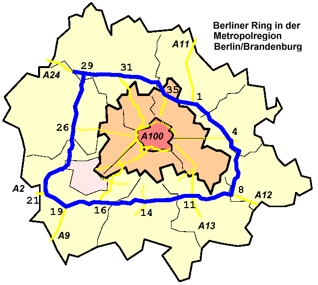 Lage des Berliner Rings in der Metropolregion Berlin Anschlussstellen: siehe Berliner Ring/A 10 Regionalkarte: siehe Metropolregion Berlin/Brandenburg